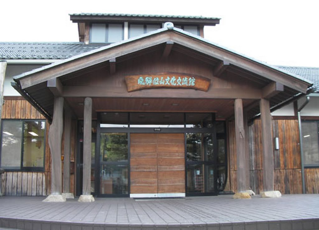 高山市図書館一之宮分館。